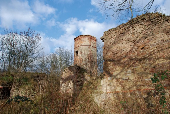 Weißandt-Gölzau, Ruine des Schlosses